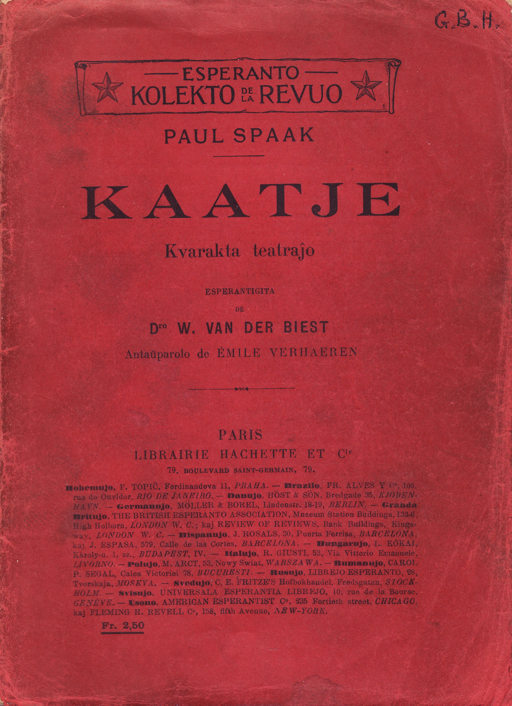 kovrilo de "Kaatje", 1911